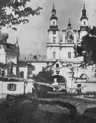 Монастир Кармелітів у Городищу.